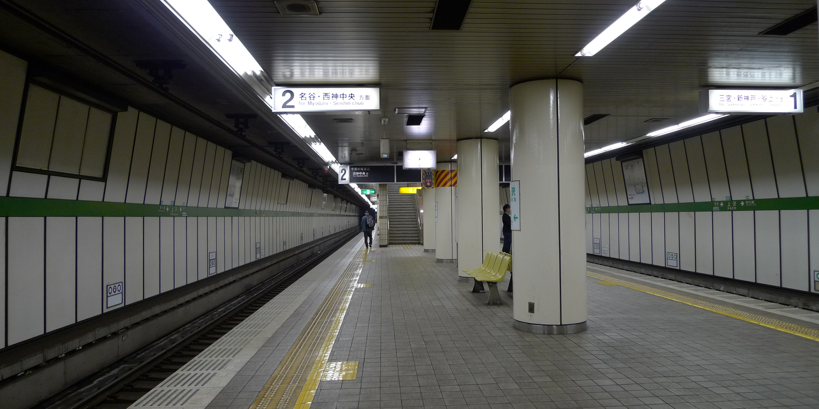 上沢駅ホーム